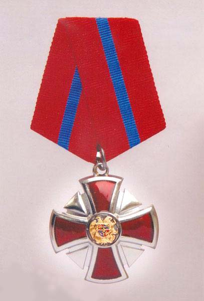 За заслуги перед Отечеством» (Армения)